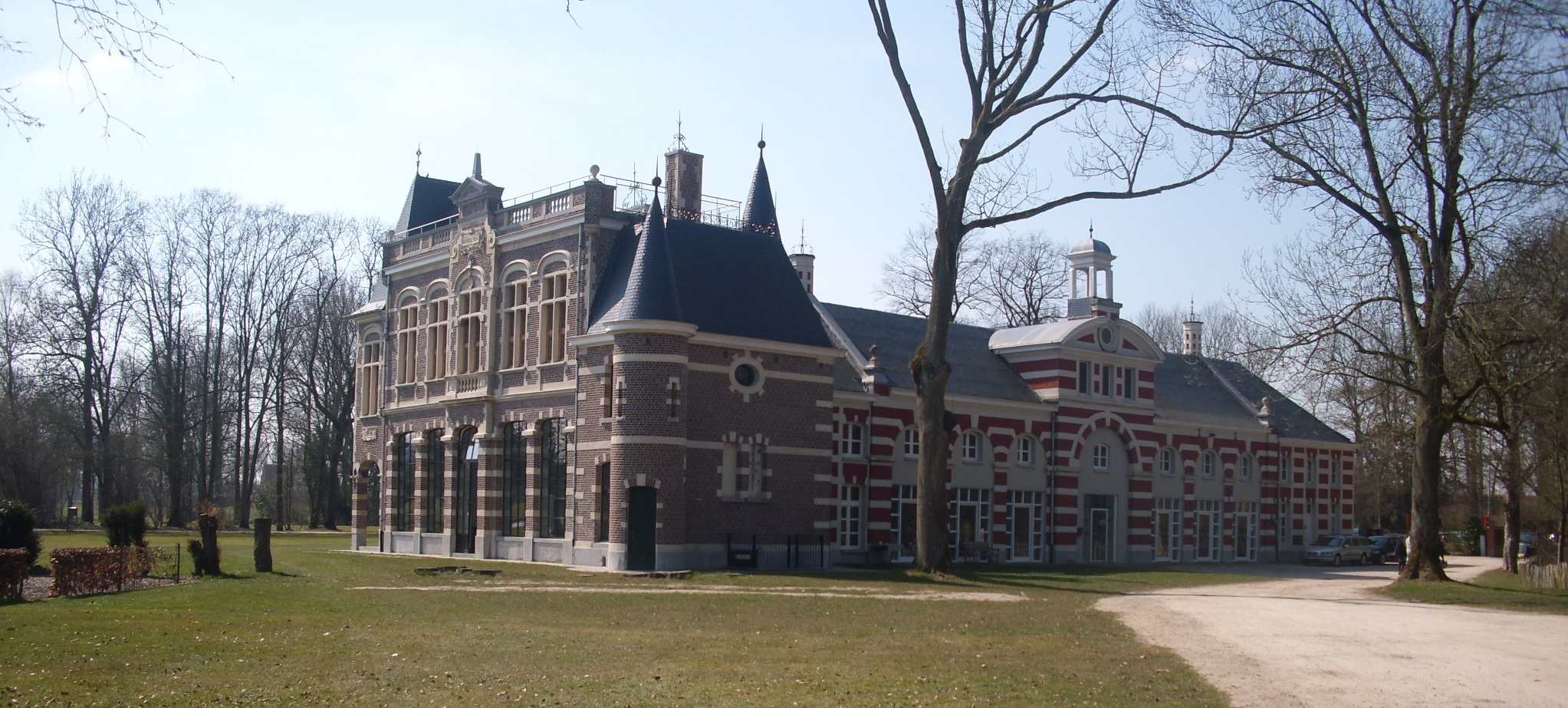 Bibliotheek en bijgebouwen - Domein de Ghellinck Elsegem - Kortrijkstraat - Elsegem - Wortegem-Petegem - Oost-Vlaanderen - België